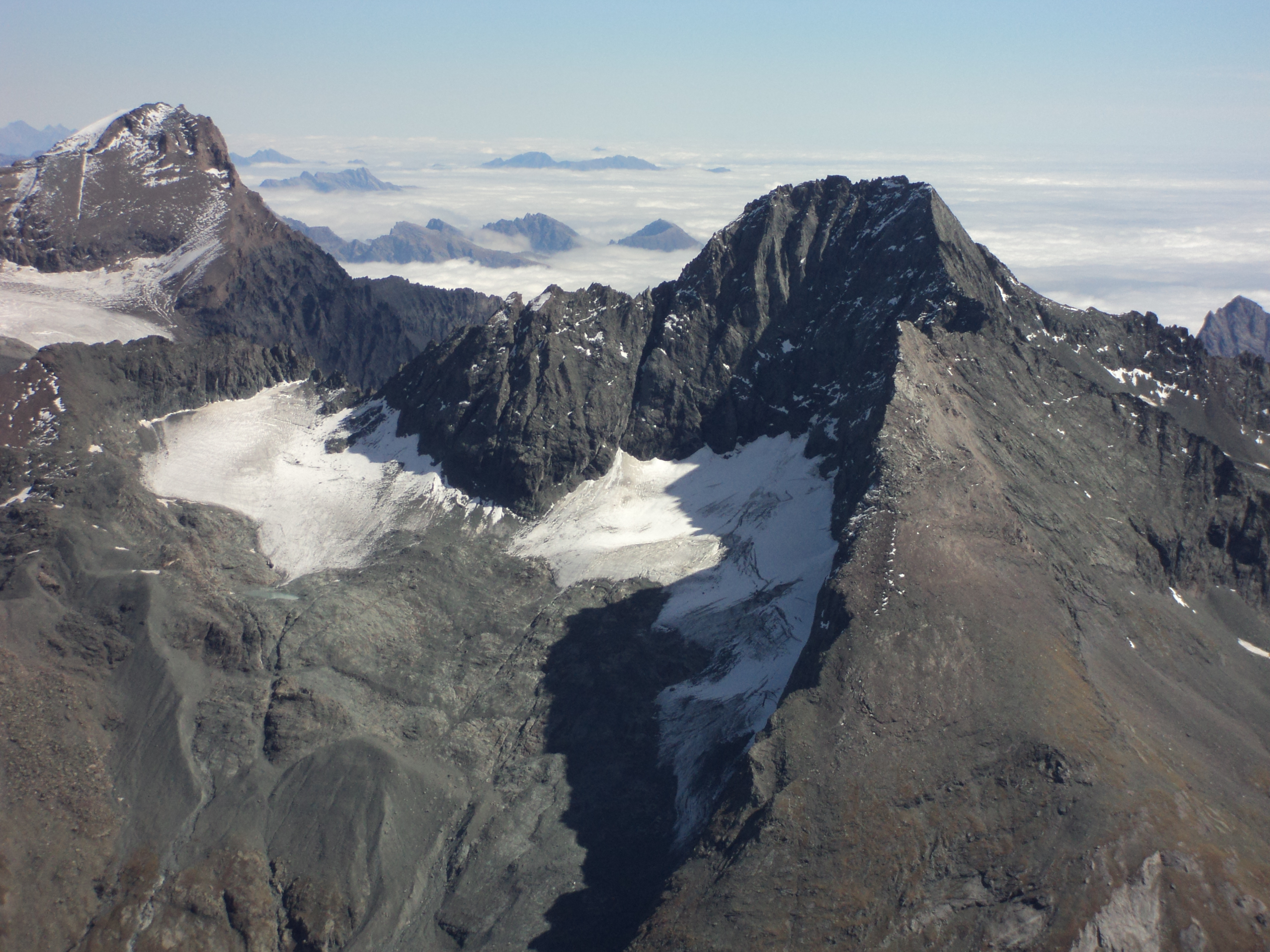 L'Uia di Bessanese vista dalla Pointe de Charbonnel - versante ovest. In fianco l'Uia di Ciamarella